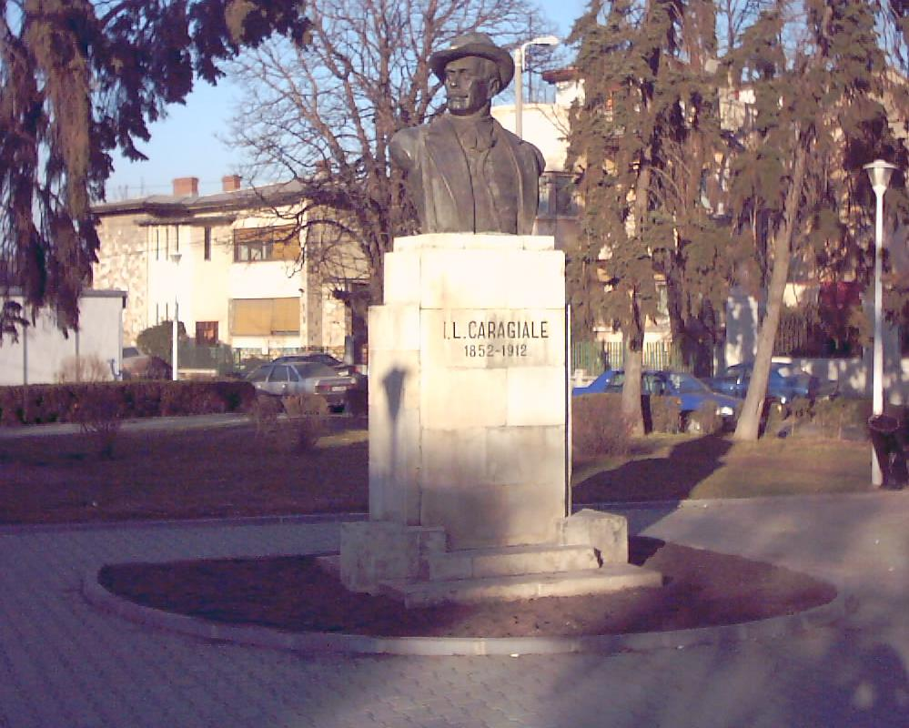 Monument în Ploiești dedicat lui Ion Luca Caragiale